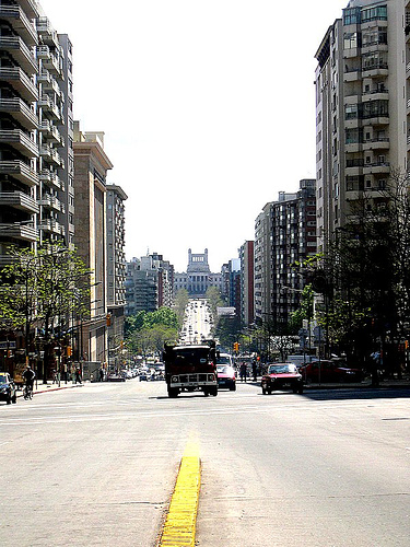 Libertador Juan Antonio Lavalleja Avenue, in Montevideo, Uruguay